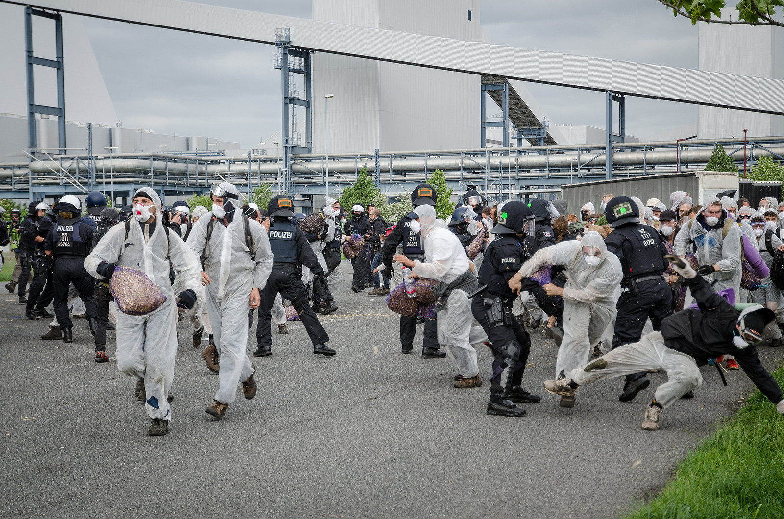 Polizei verhaftet Aktivisten auf einem Parkplatz vor dem Gelände des Kraftwerk Schwarze Pumpe, creative commons EG2016